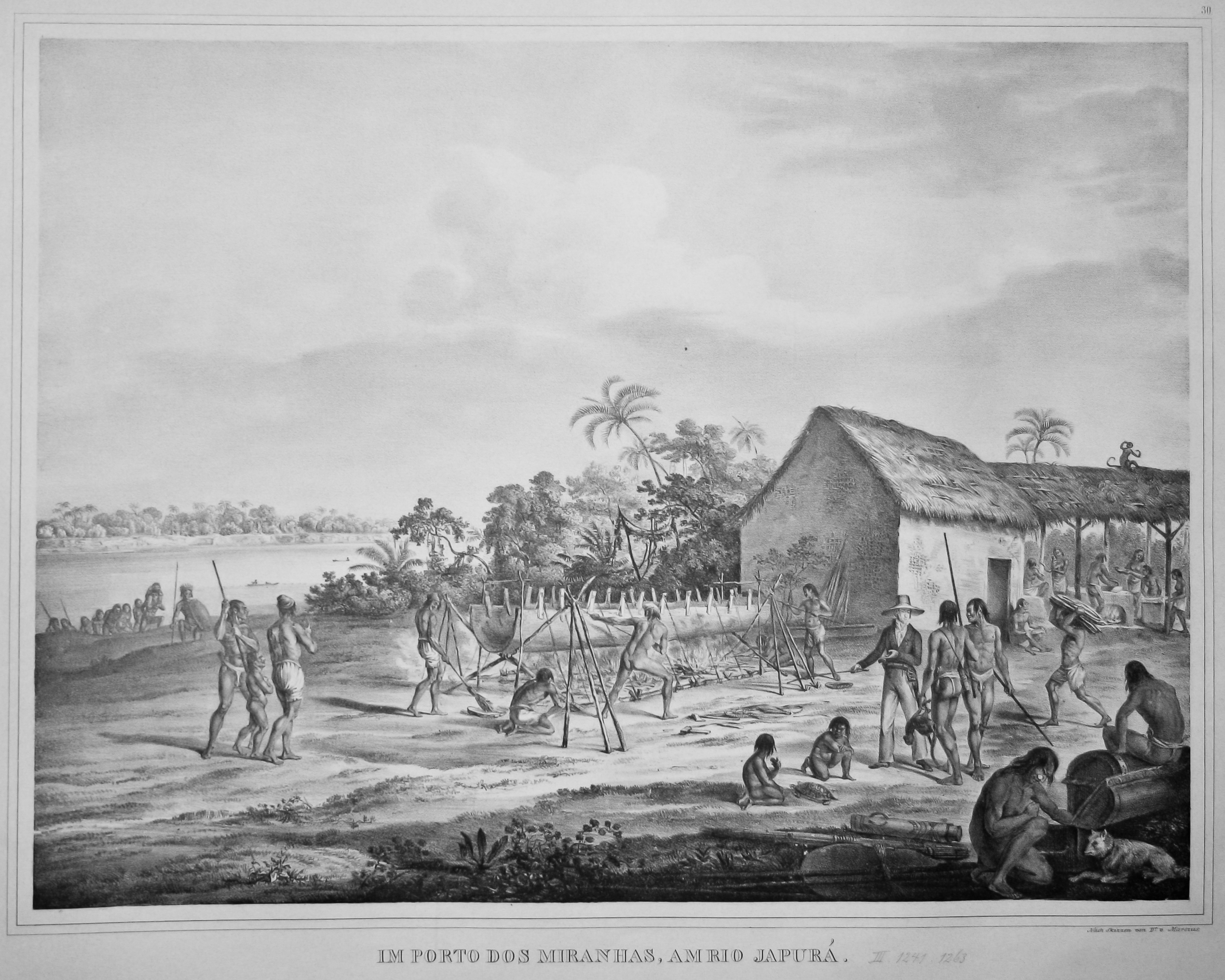 Orignial-Dateien der Digitalisierung von Spix' Reiseatlas (1823-1831 Reise in Brasilien auf Befehl Sr. Majestät Maximilian Joseph I. König von Baiern in den Jahren 1817-1820 gemacht und beschrieben - Atlas)